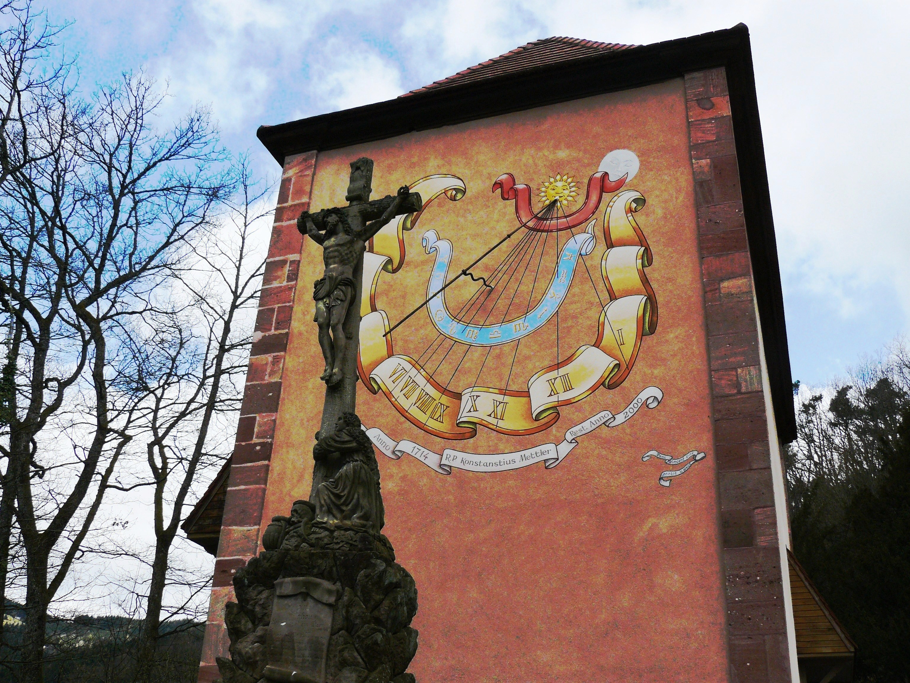 Cadran solaire à l'arrière de la chapelle de Notre Dame de Lorette (Murbach, Alsace, France).